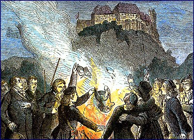 Bücherverbrennung auf der Wartburg am 18. Oktober 1817 , kolorierter Holzstich